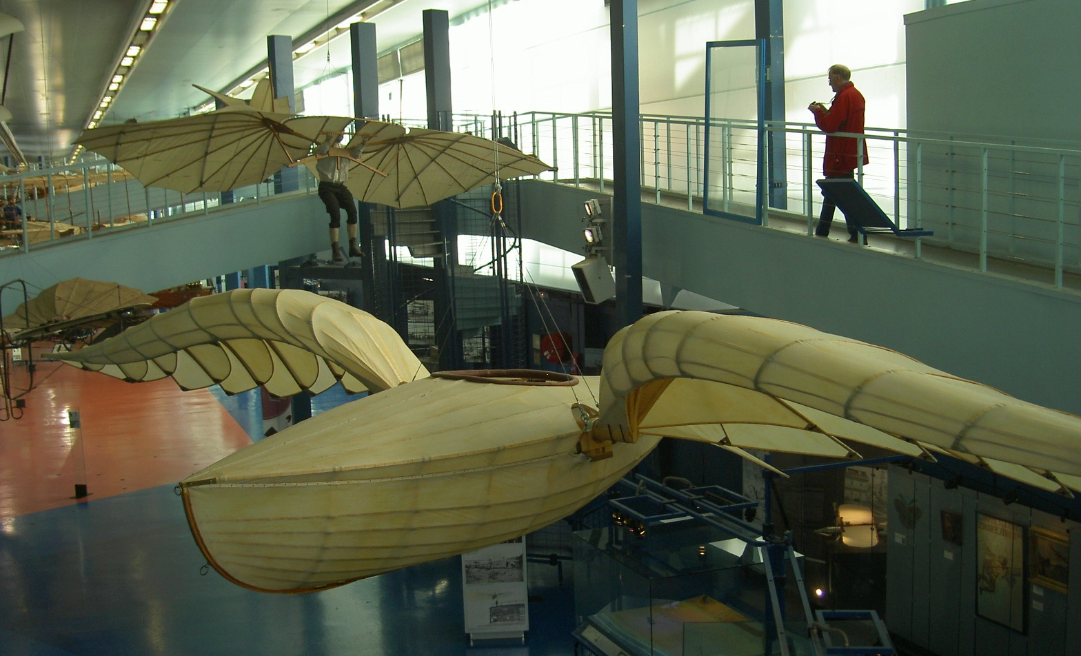 French gliders ("Barque ailée" from JM. Le Bris)